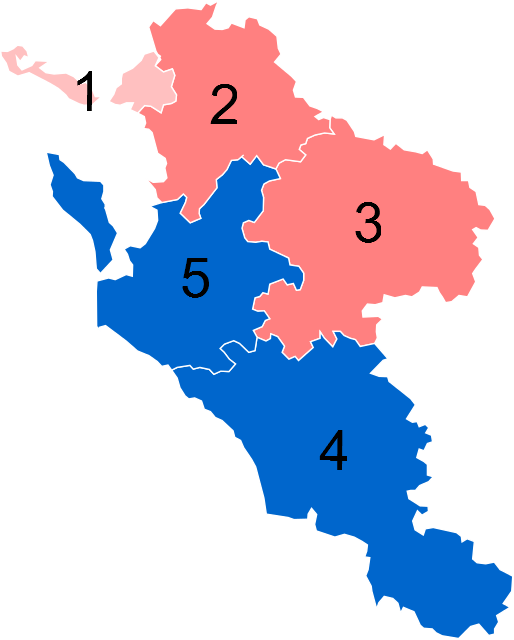 Résultats des élections législatives de Charente-Maritime en 2012